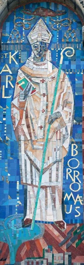 Paul Thalheimer: Karl Borromäus, Fassadenmosaik an St. Karl Borromäus, Nürnberg